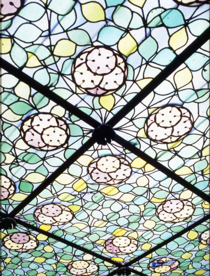 Detalle de claraboya original de la casa Trinxet (Material procedente de la casa Trinxet recolocado sin criterio alguno en masia de Calella , se cortaron y modificaron piezas únicas sin criterio ni gusto alguno)